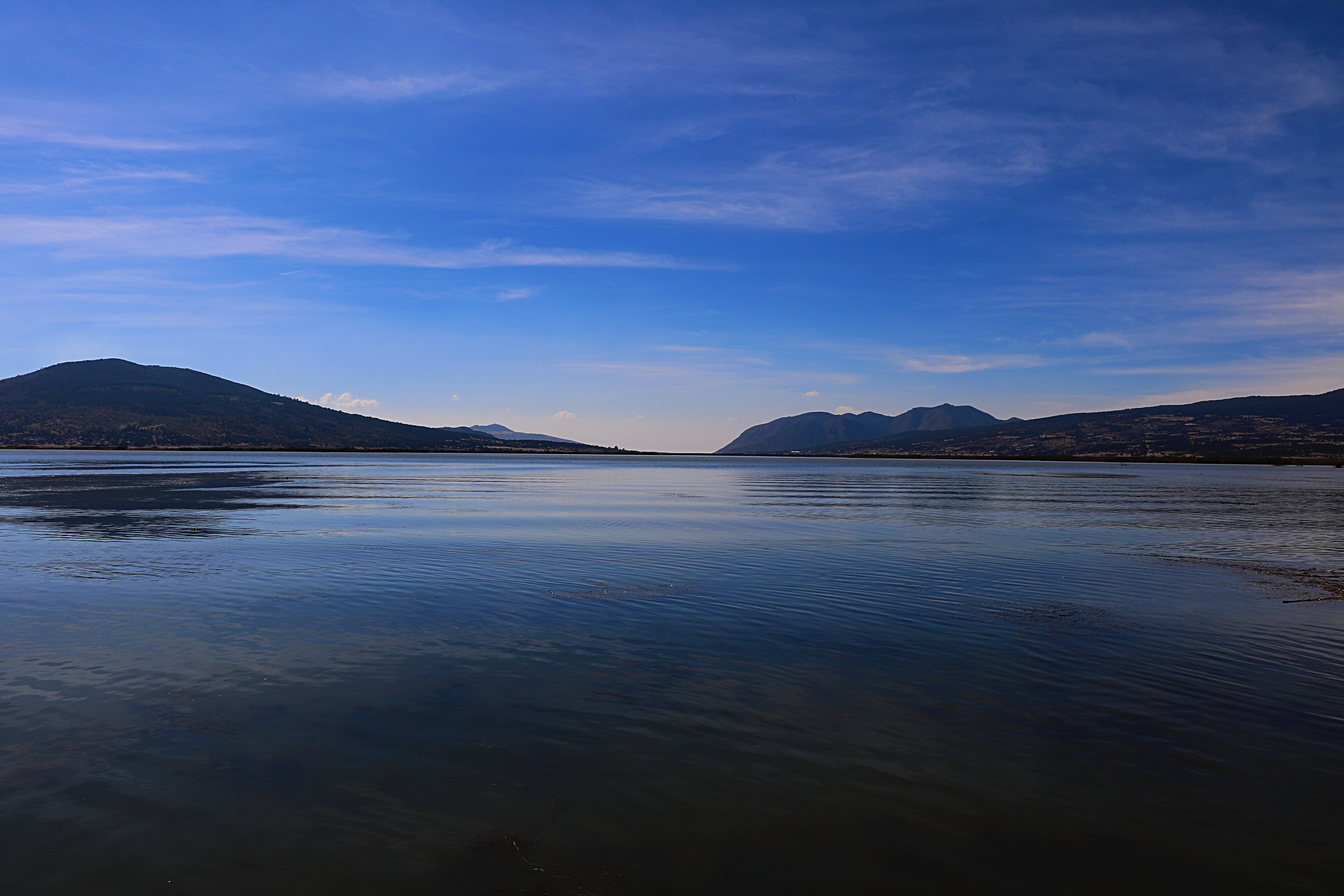 Laguna de Tecocomulco.